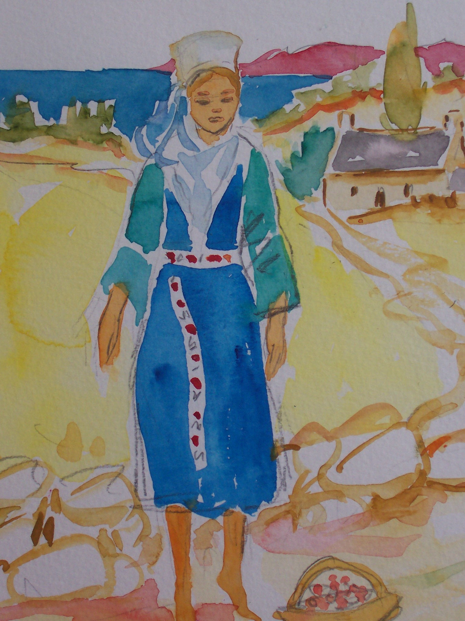 aquarelle d'Emile Rocher